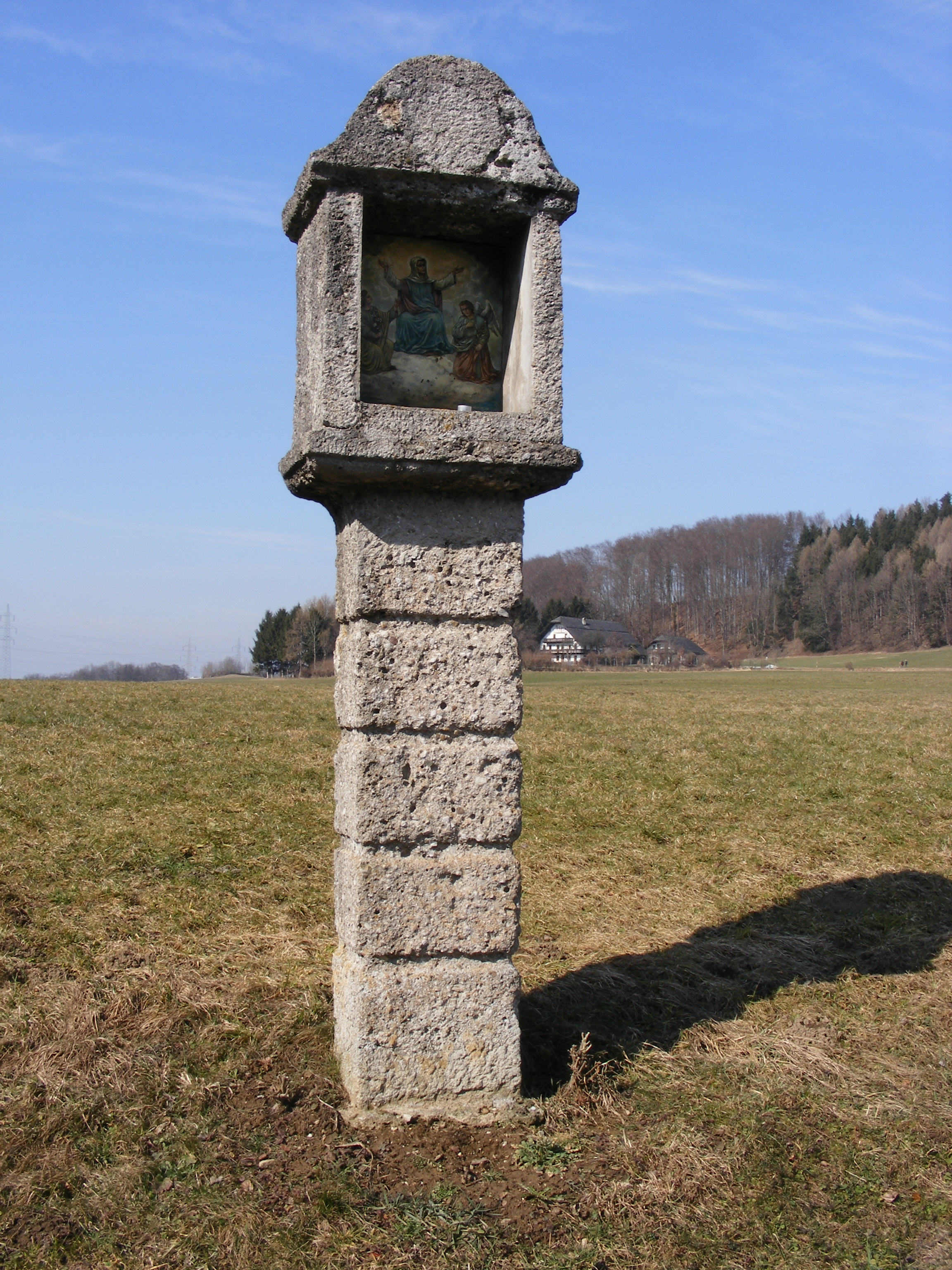 Bildstock XIV der Geheimnissäulen auf dem Weg nach Maria Plain, Bergheim, Land Salzburg, Österreich